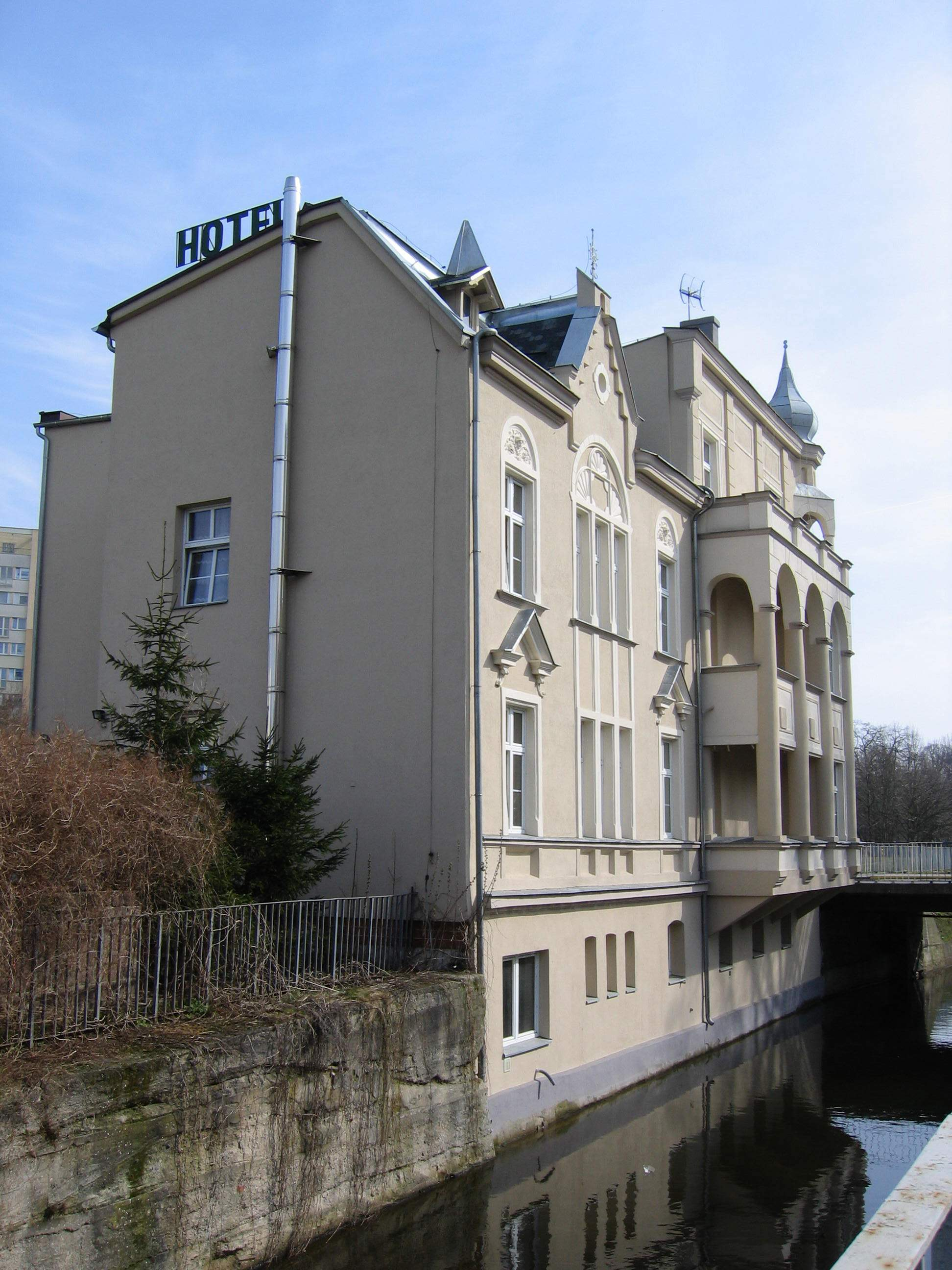 Stargard Szczeciński, Kuśnierzy 5 - dom (obecnie hotel)